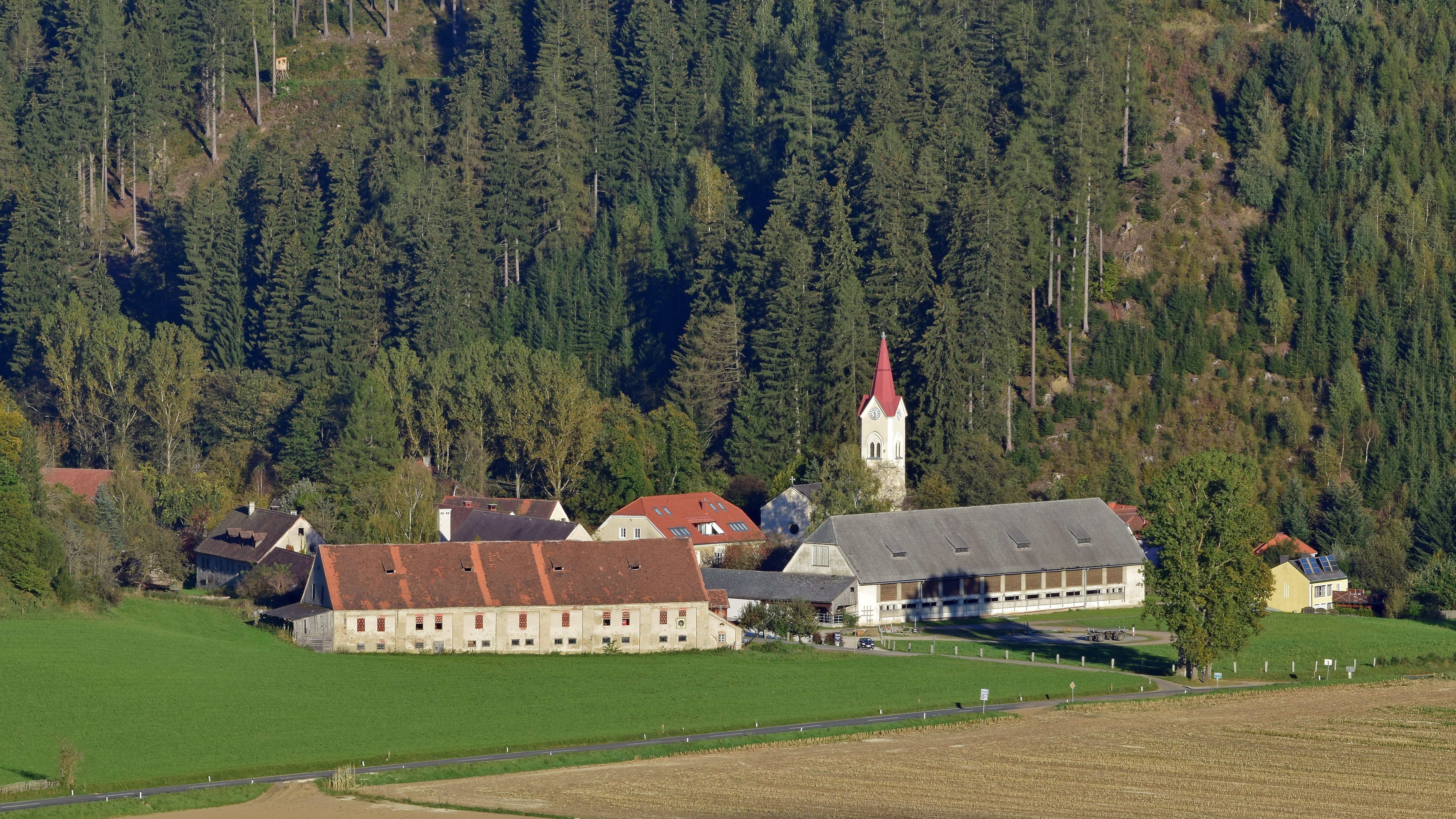 Ansicht des Ortes Allerheiligen in der Gemeinde Pöls-Oberkurzheim mit der Pfarrkirche hl Margaretha.